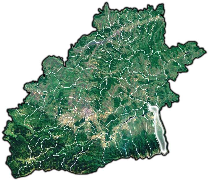 Arpasu de Jos jud Sibiu.